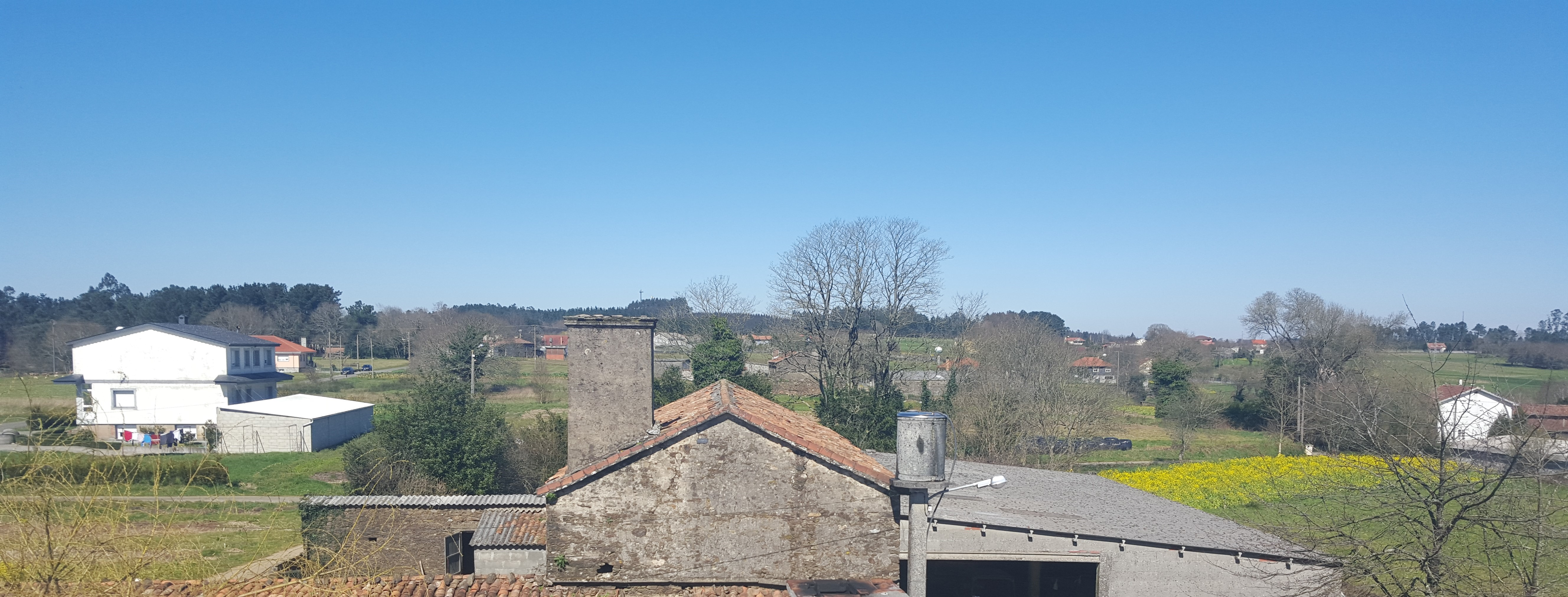 A aldea de Burgao, en Trasmonte, Oroso